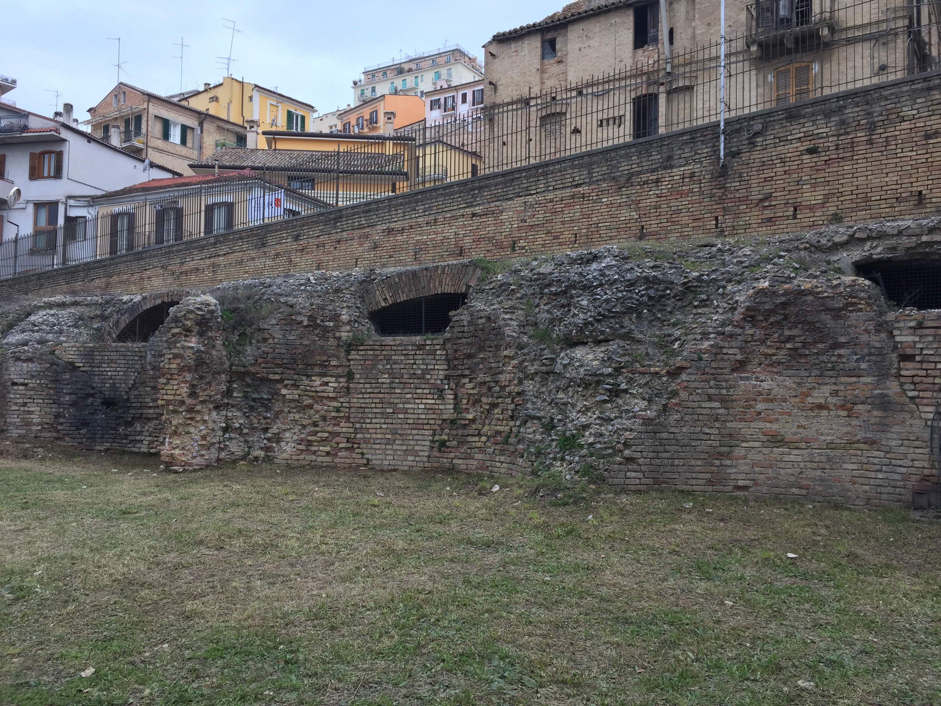 Una cisterna che alimentava le terme romane di Chieti, vista dall'esterno